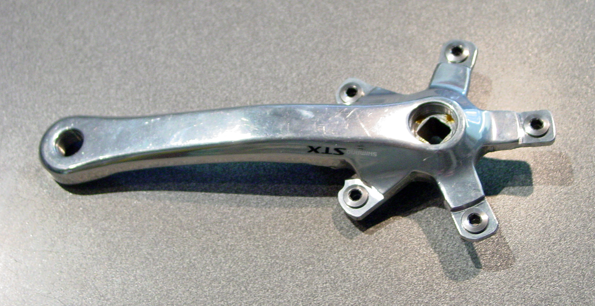 Fahrradtechnik